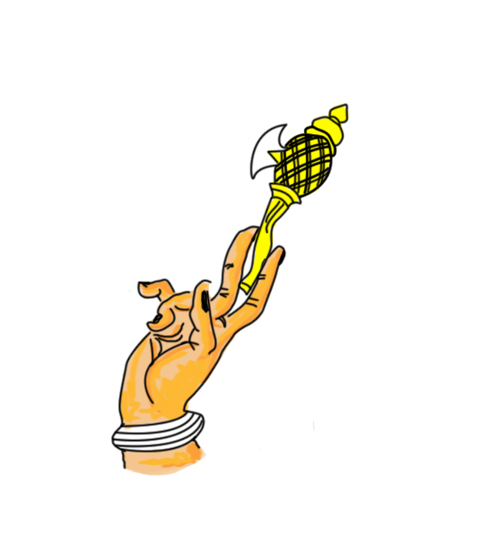 சிவ சின்னம் மழு